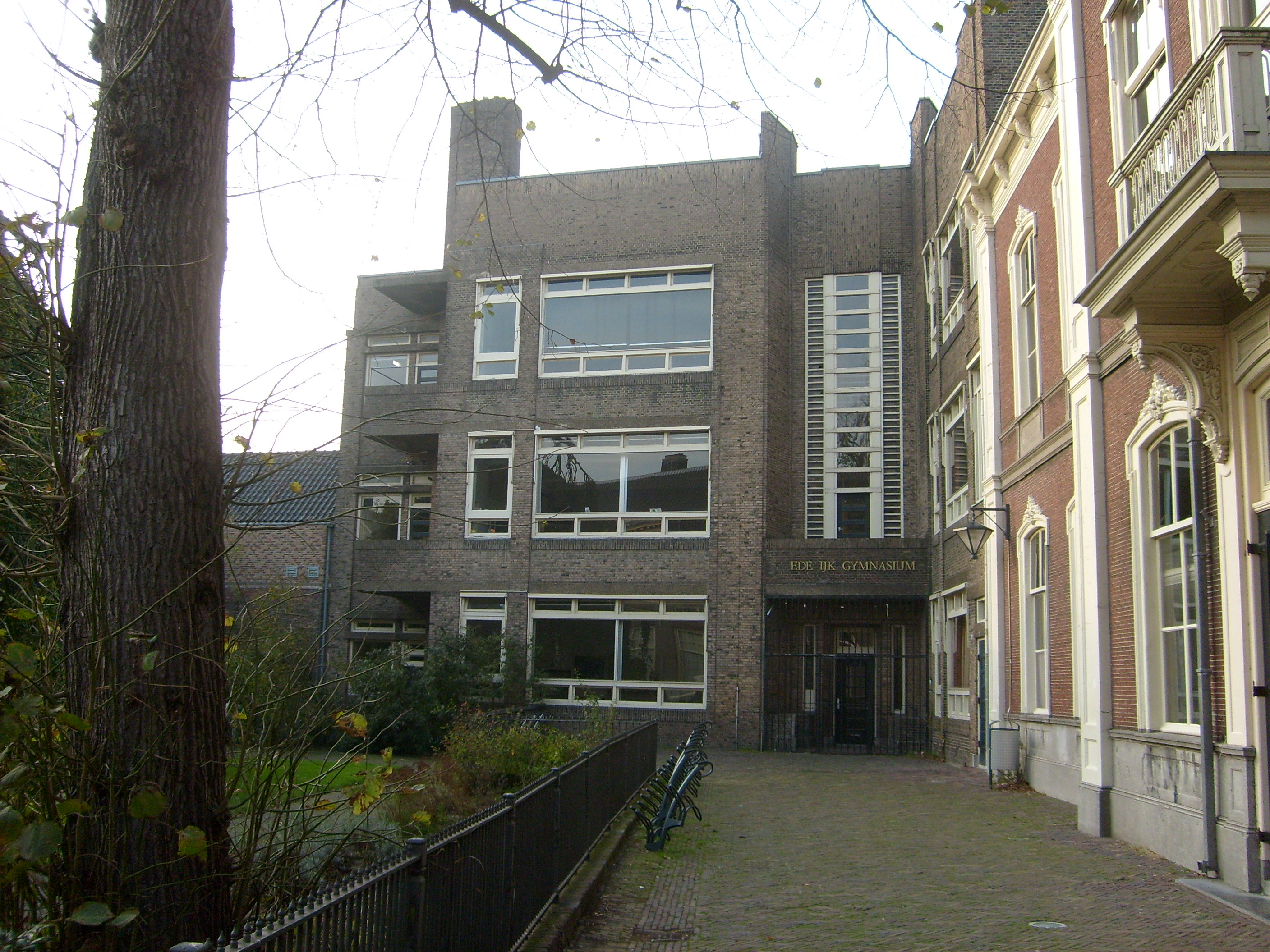 'Nieuwbouw' Stedelijk Gymnasium uit 1923, architect Jan Buijs. Het oorspronkelijke gebouw is uit 1879. Beschrijving hier